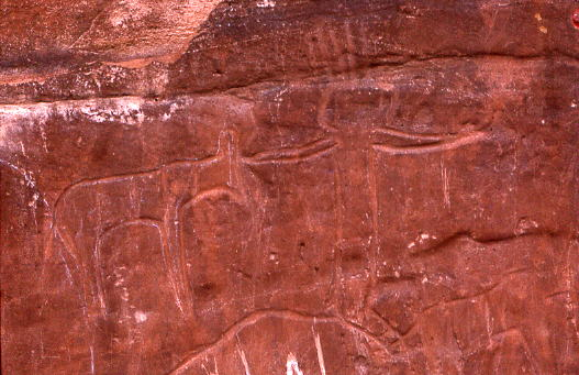 Gravure préhistorique de la région d'Ain Sefra, Thyout, Algérie